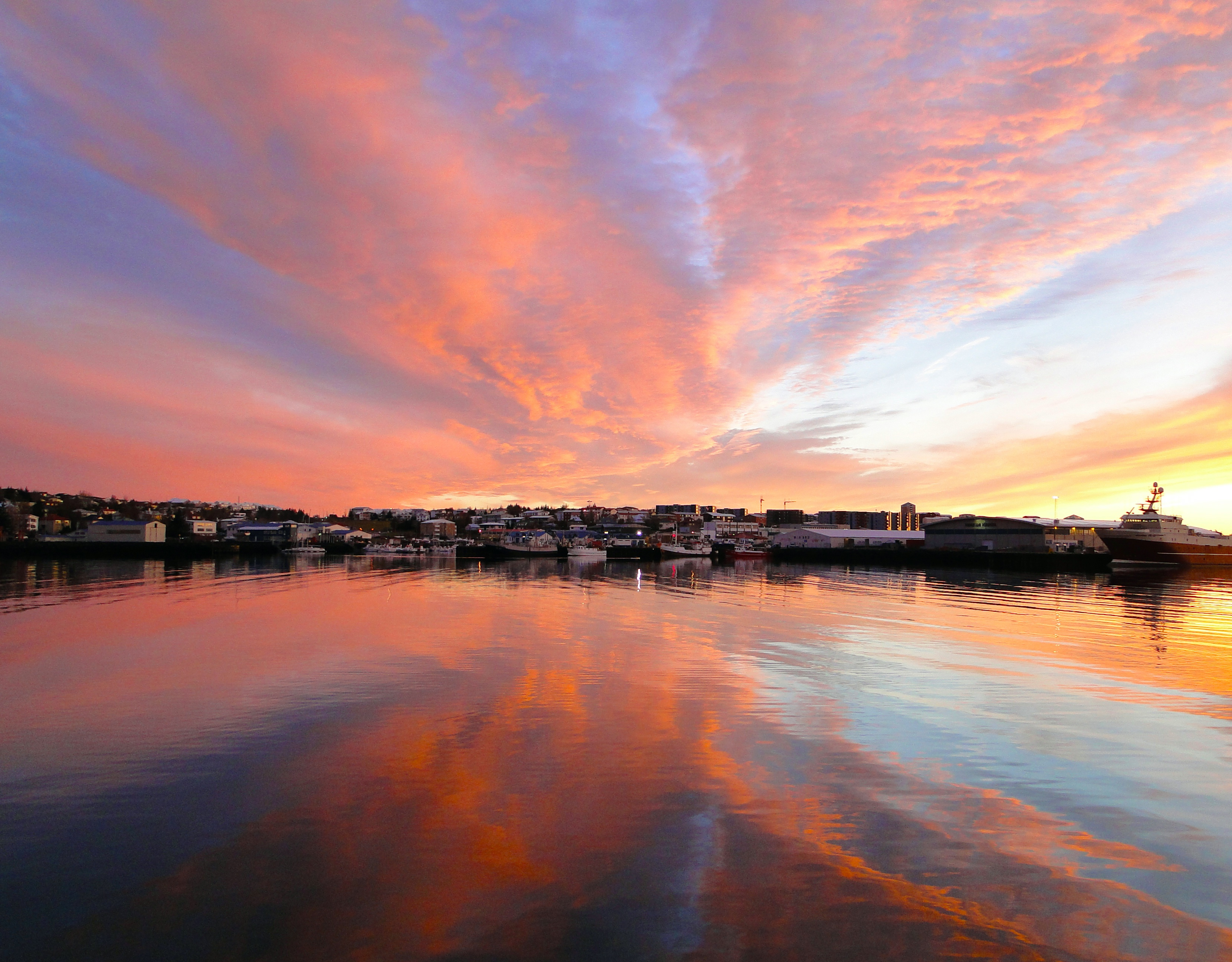 Hafnarfjörður